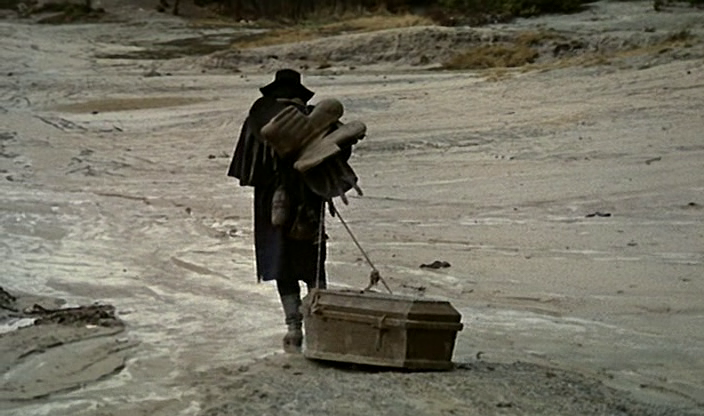 screenshot da Django